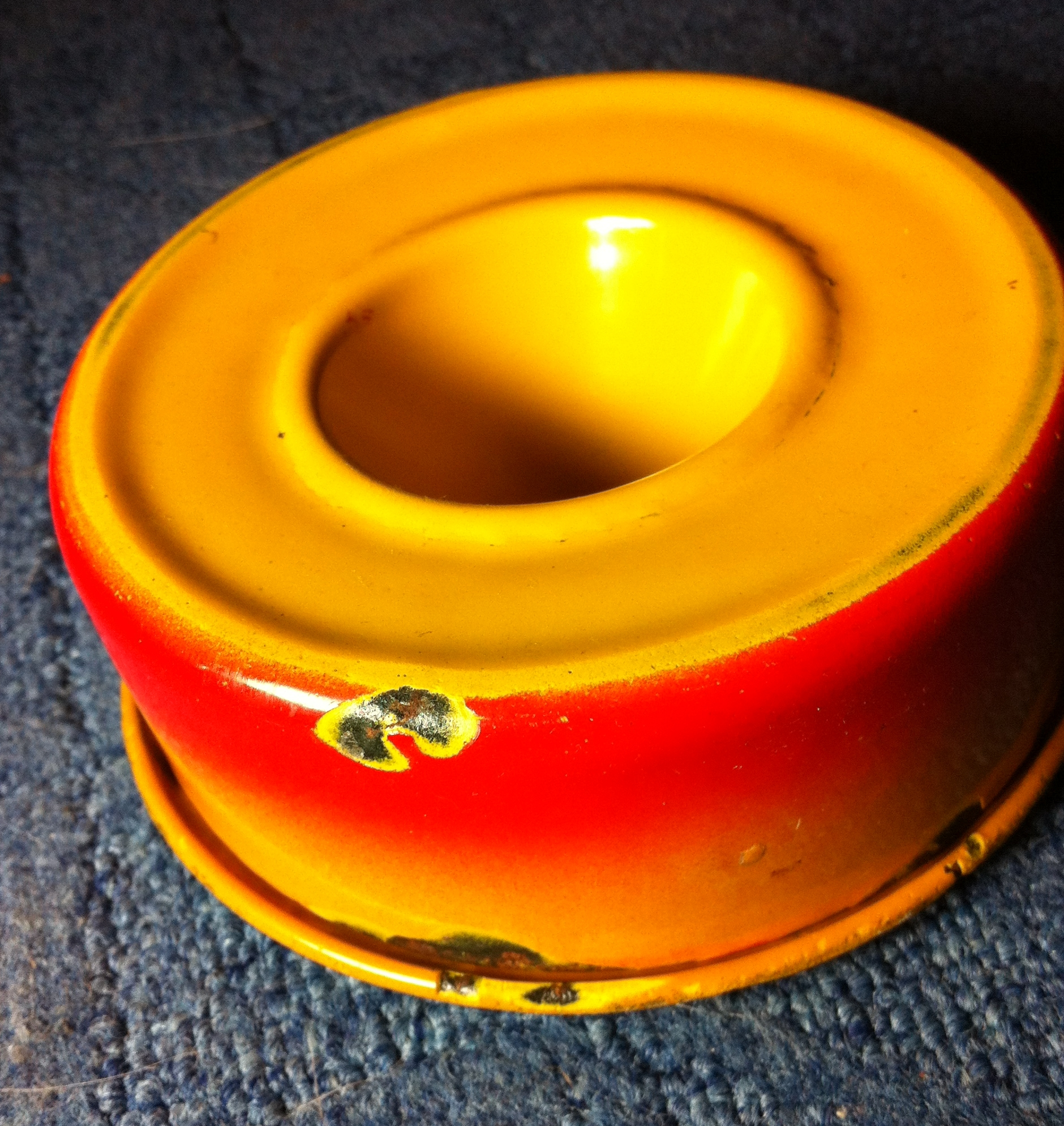 Abplatzung an einem emaillierten Geschirrteil aufgrund eines Stoßes